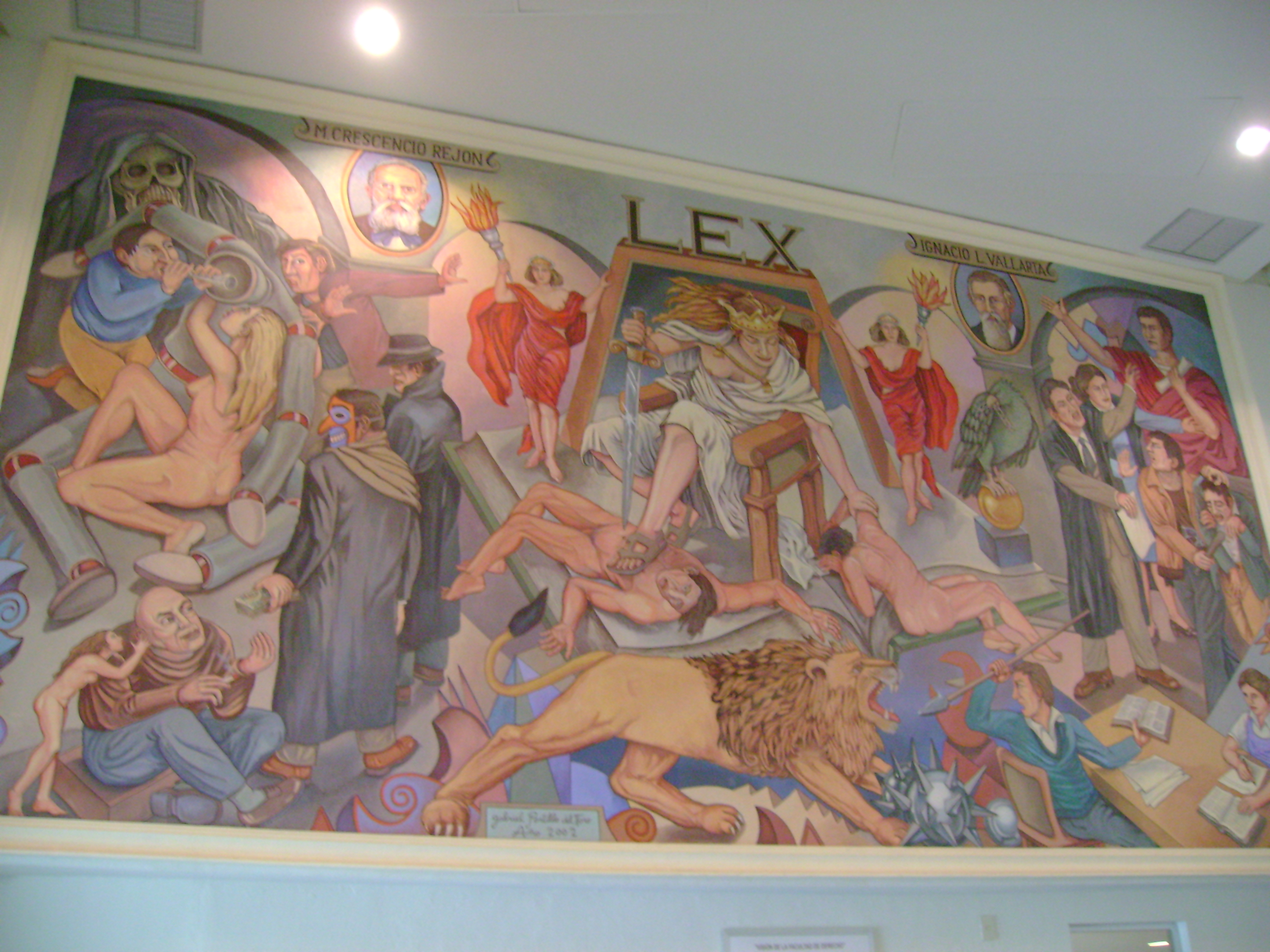 Mural de la Facultad de Derecho de la Universidad de Colima de Gabriel Portillo del Toro